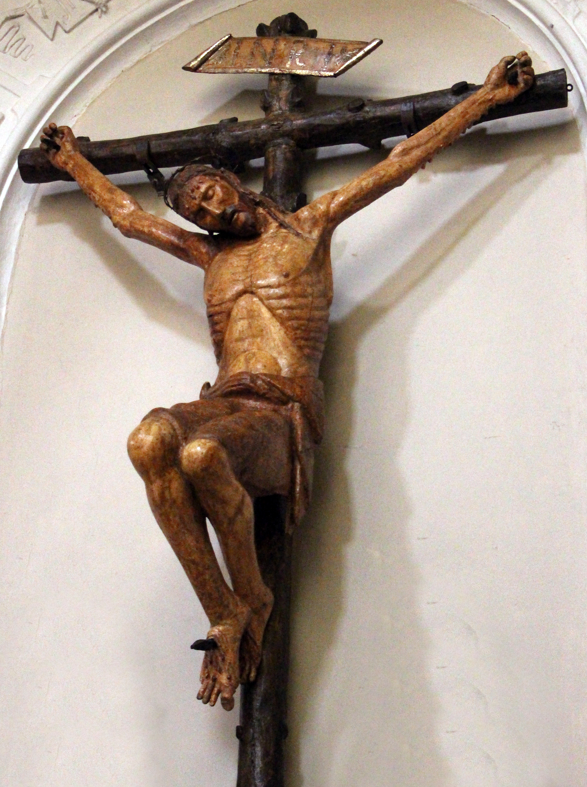 Ozieri